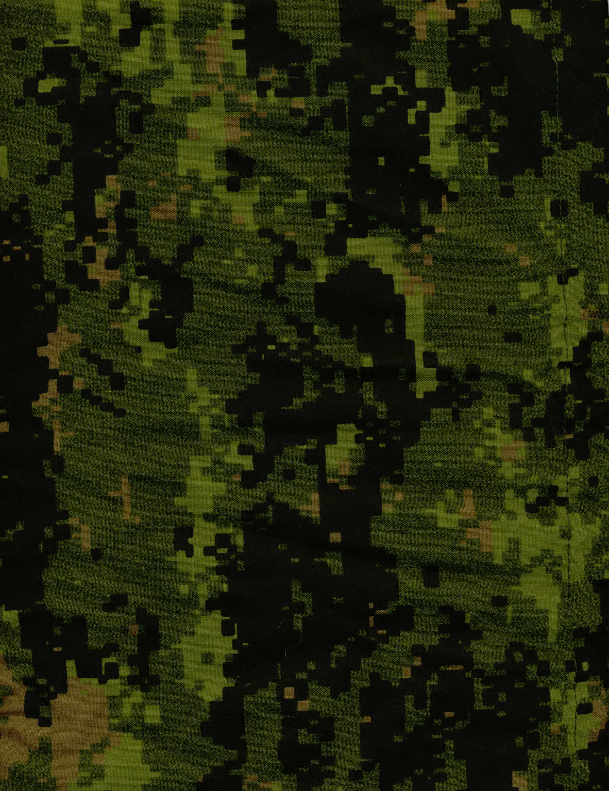 Camouflage CADPAT